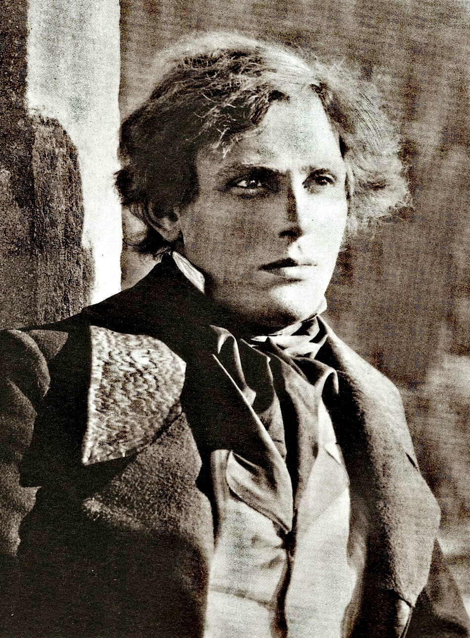 Рекламная открытка с актером Густавом фон Вангенхаймом 1921 года.